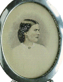 チェスター・アーサー大統領夫人、エレン・アーサー。 大統領の部屋に飾られていた銀縁の肖像画。